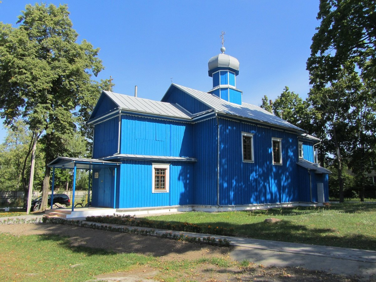 Жабчыцы (Садовы). Свята-Параскева-Пятніцкая царква This is a photo of Belarusian heritage monument. Reference number: 113Г000722 ( WLM)